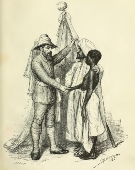 L'Union des trois races, dessin allégorique par Eugène Broerman